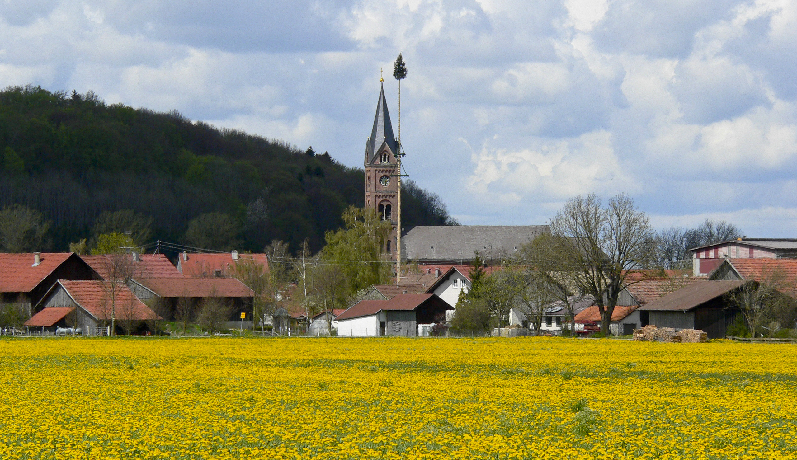 Pfarrkirche "St. Johannes Baptist" in BaisweilThis is a photograph of an architectural monument.